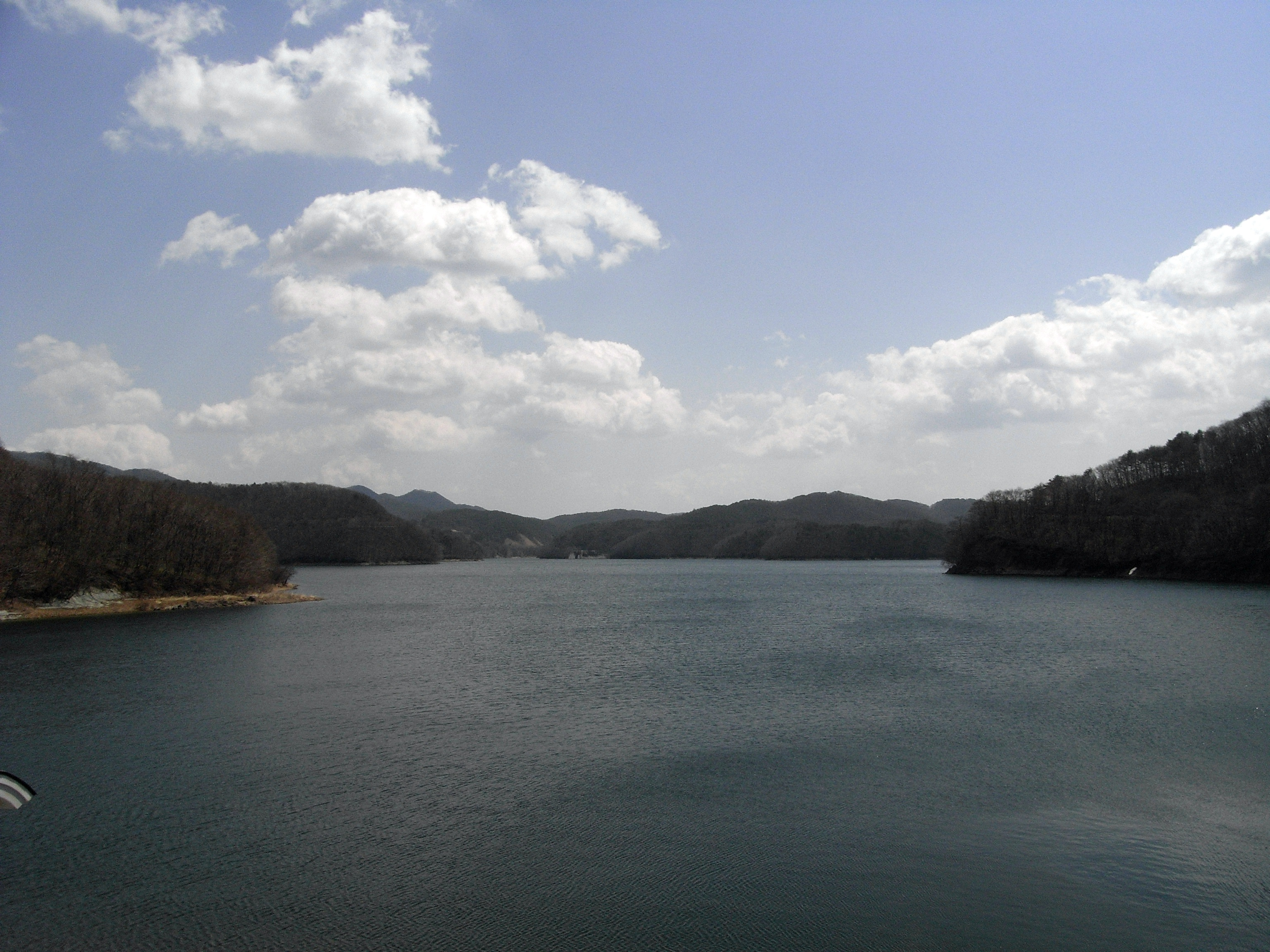 Dam